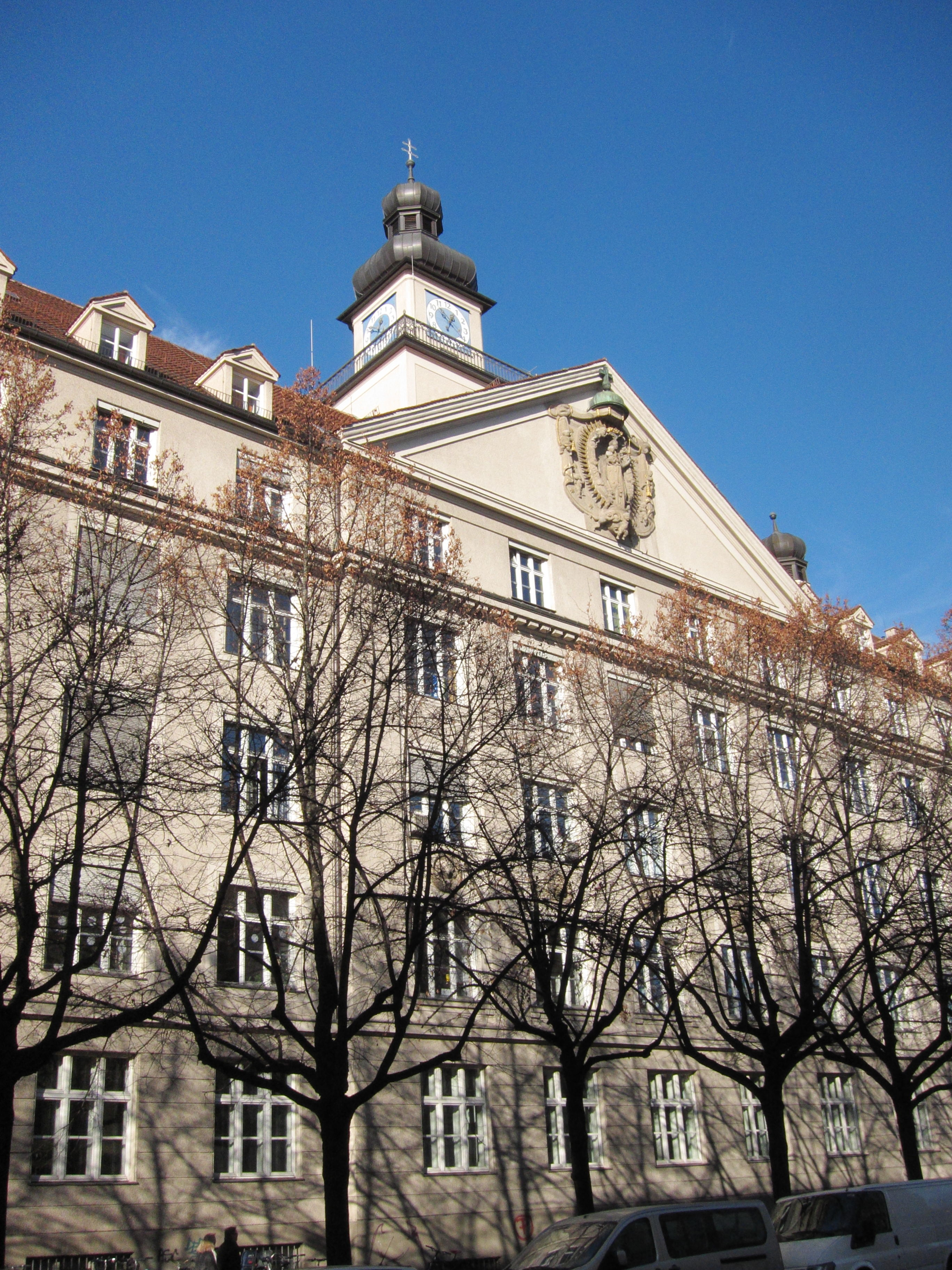 Blumenstraße 26; Schule der Armen Schulschwestern, sog. Angergymnasium, barockisierende Dreiflügelanlage mit Mittelrisalit samt Dreiecksgiebel und Uhrturm, 1914/16 von Franz Xaver Boemmel